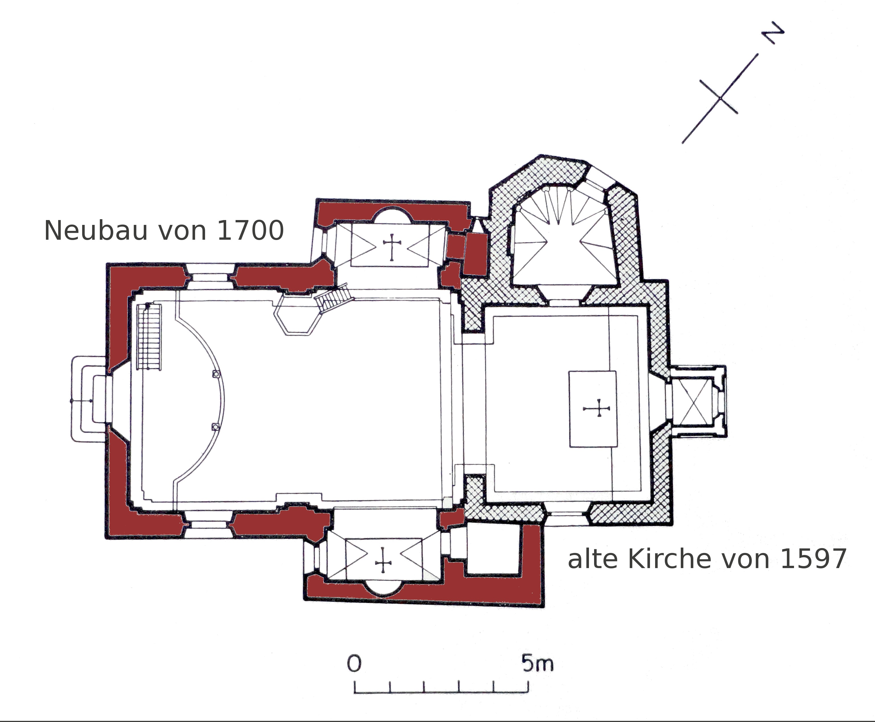 Katholische Kirche Camuns: Plan